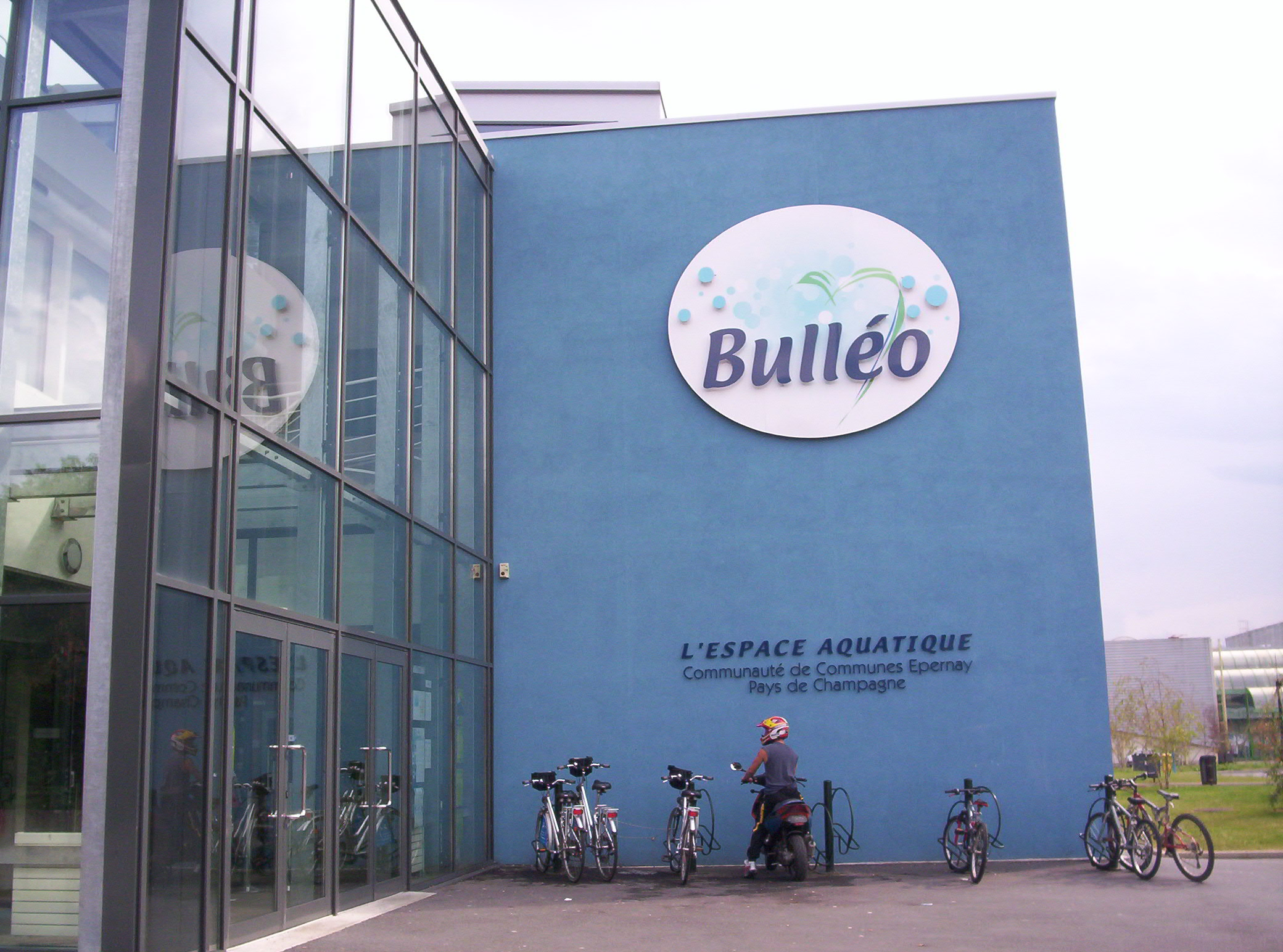 Bulléo : espace aquatique de la CC Épernay-Pays de Champagne, Épernay, Marne, France